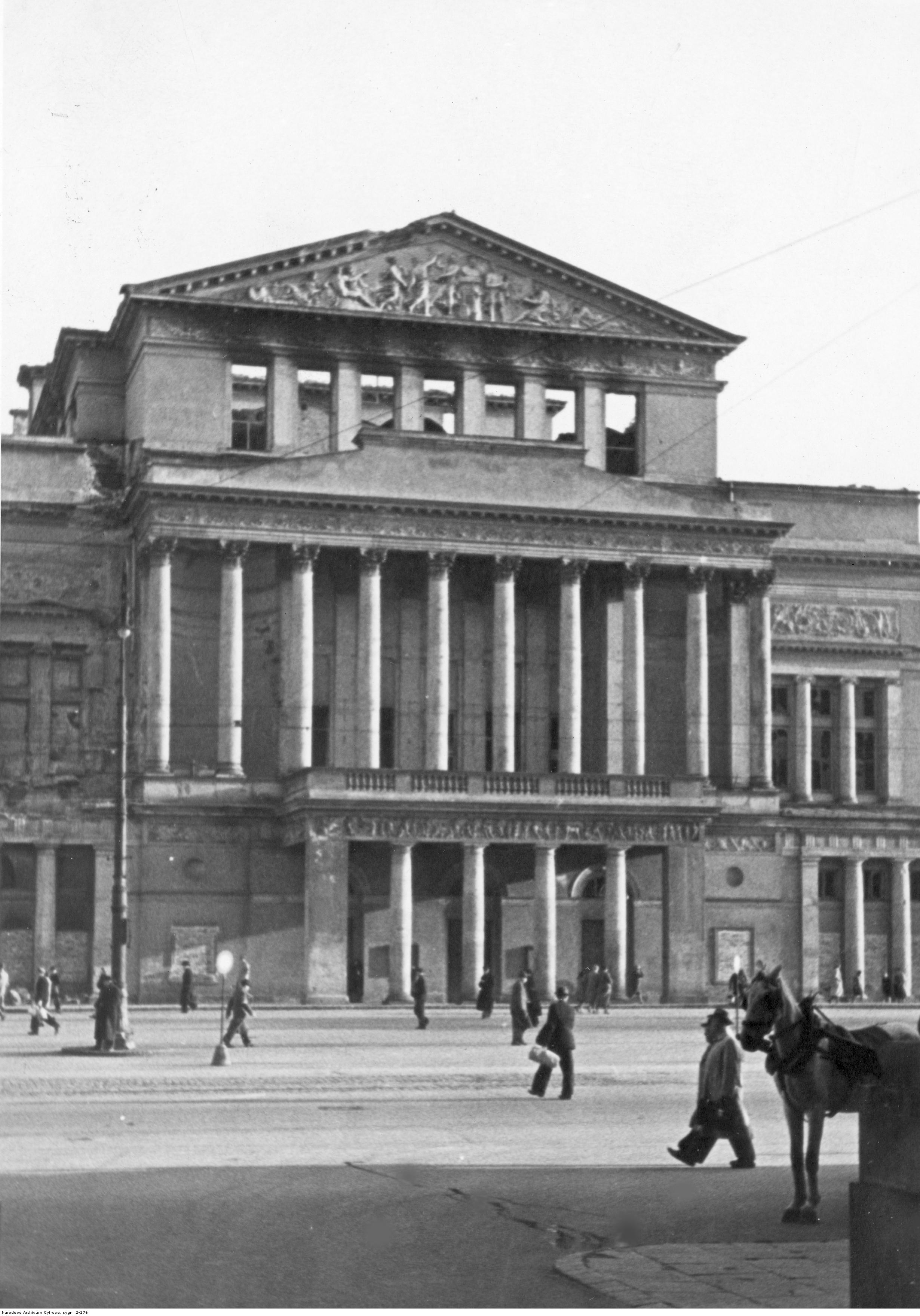 Fragment uszkodzonego Teatru Wielkiego.